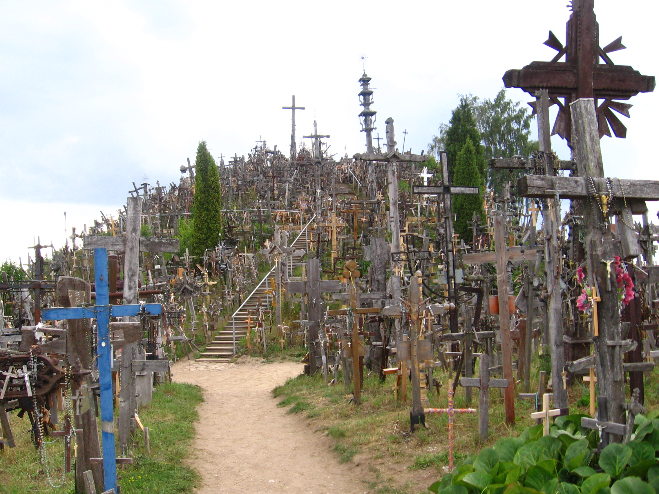 Kryžių kalnas